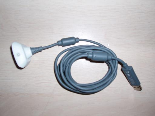 Play& Charge Kit Xbox 360